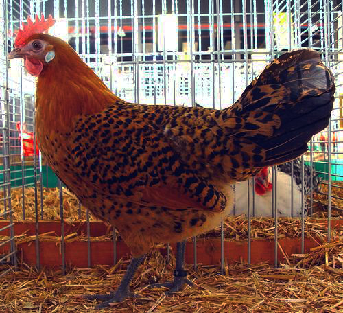 eigen foto categorie:Afbeelding kip